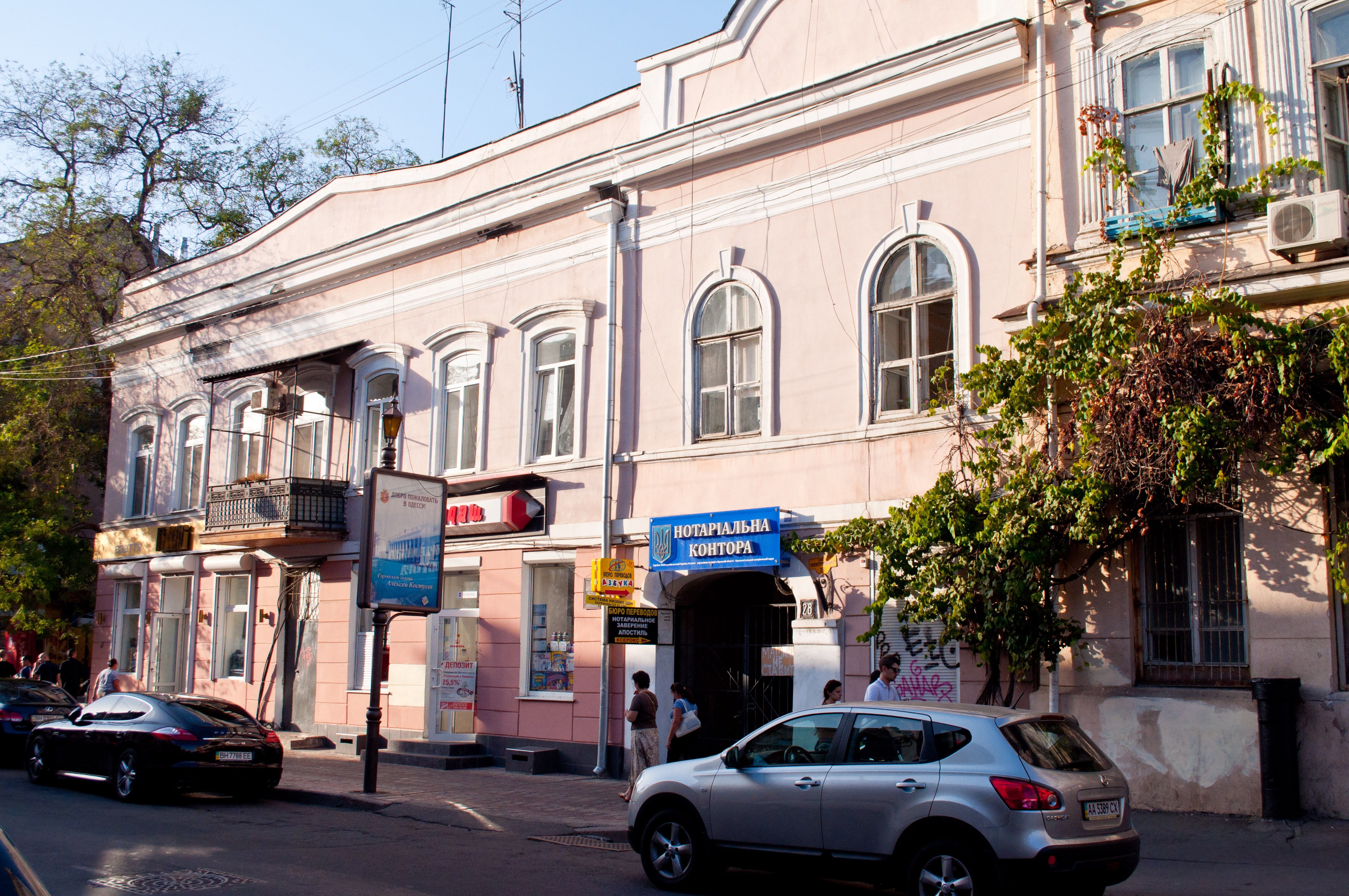 Будинок житловий Карузо